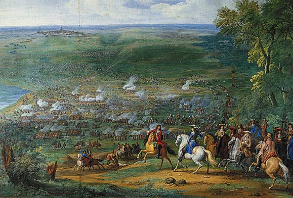 Peinture du peintre Sauveur Le Conte, représentant la victoire du Grand Condé lors de la bataille de Rocroi en 1643.